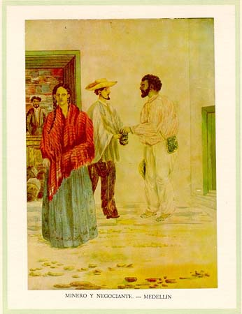 Gentes de la provincia de Medellín en la segunda mitad del siglo XIX, acuarela sobre papel.